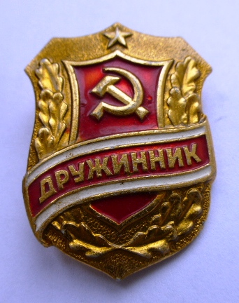 Нагрудный знак общественного дружинника.